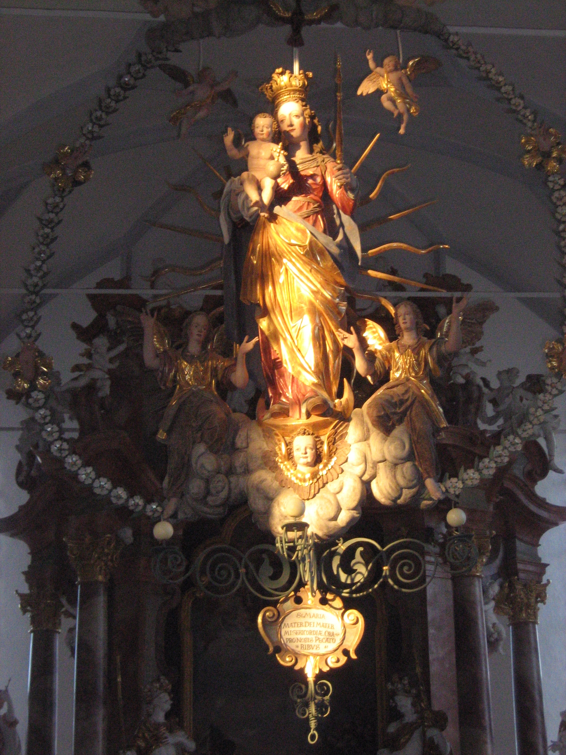 Rosenkranzmadonna im Abendlicht in der Kirche St. Georg am Auerberg